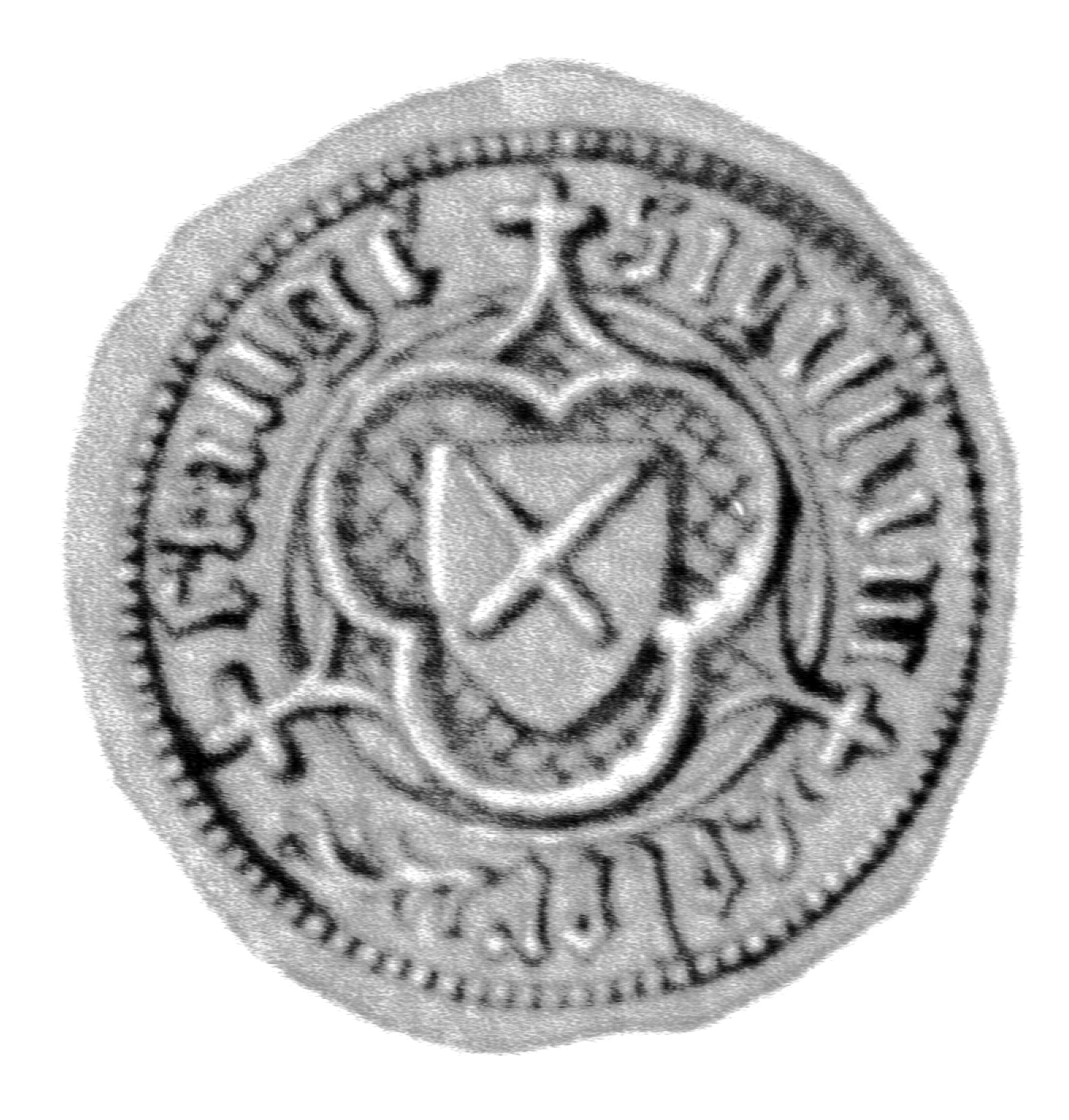 Siegel des Harnischmachers und Ratsmannes Eler Stange. Das Siegel stammt aus der Zeit um 1411. Siehe Emil Ferdinand Fehling: Lübeckische Ratslinie, Nr. 449 (Elert Stange, BM).